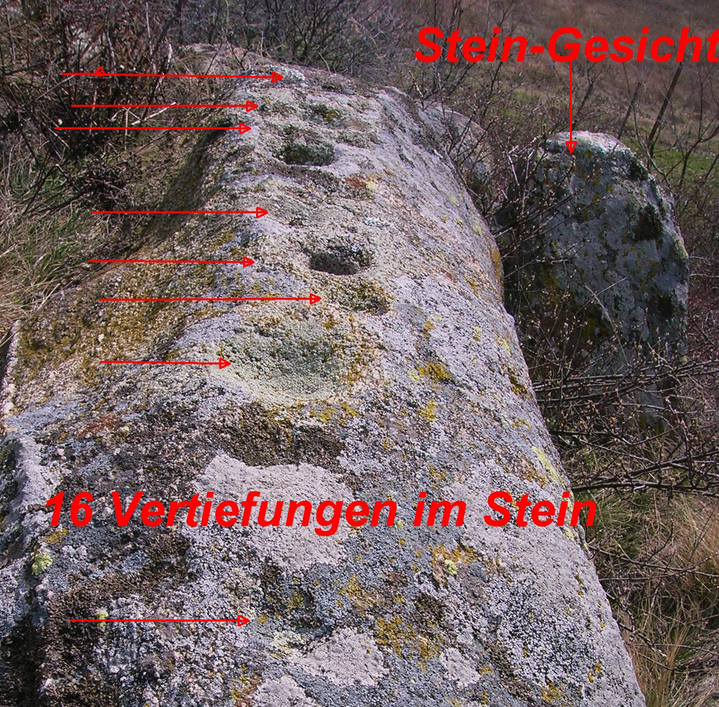 Kalenderstein Leodagger mit 16 Schälchen